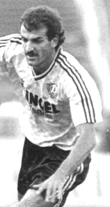 5.9.90 Halle: Oberliga- HFC Chemie - 1. FC Dynamo Dresden 3:1- (1:1) Dirk Wüllbier (M.-Halle) trug sich in der 33. Spielminute als erster in die Torschützenliste ein und brachte seine Mannschaft in Führung. Rechts: Sergio Allievi (Dresden). Links: Karsten Neitzel (Halle). ADN-Wolfgang Kluge